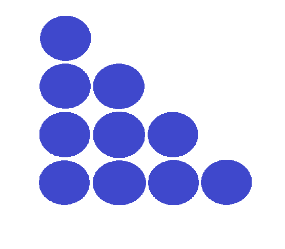 An example of a triangular number, more precisely, the 4th triangular number.